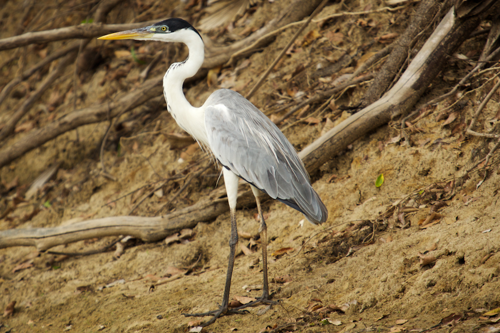 Cocoi Heron Ardea cocoi Pantanal 2009